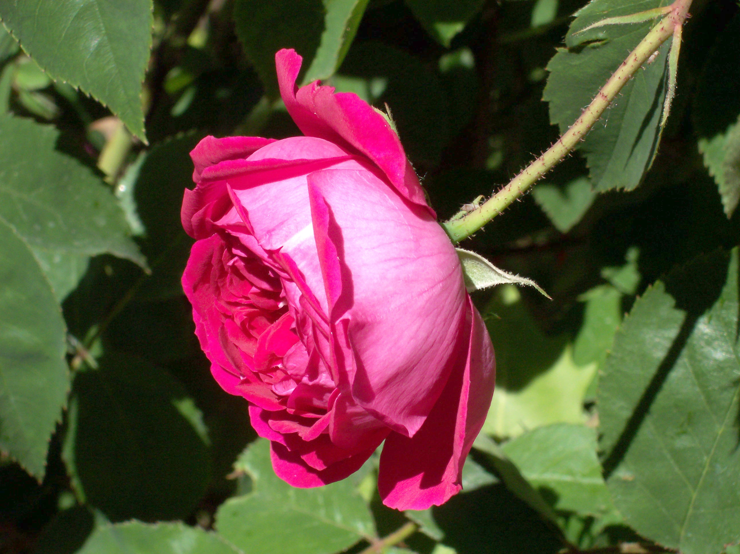 Rosa 'Bourbon Rose', gr. Borbonianas, sect. Chinensis. Real Jardín Botánico, Madrid